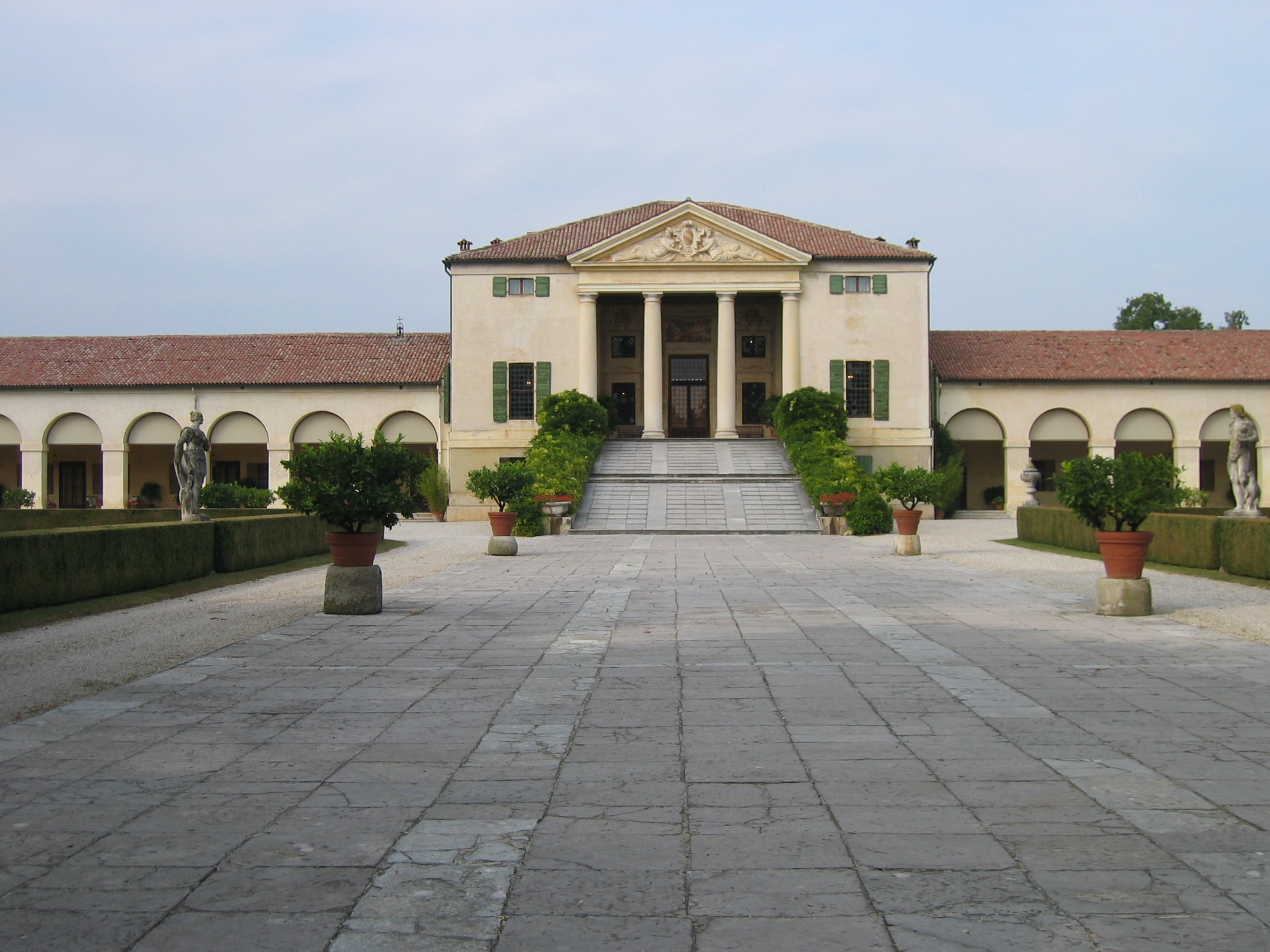 Eigen foto. oktober 2006